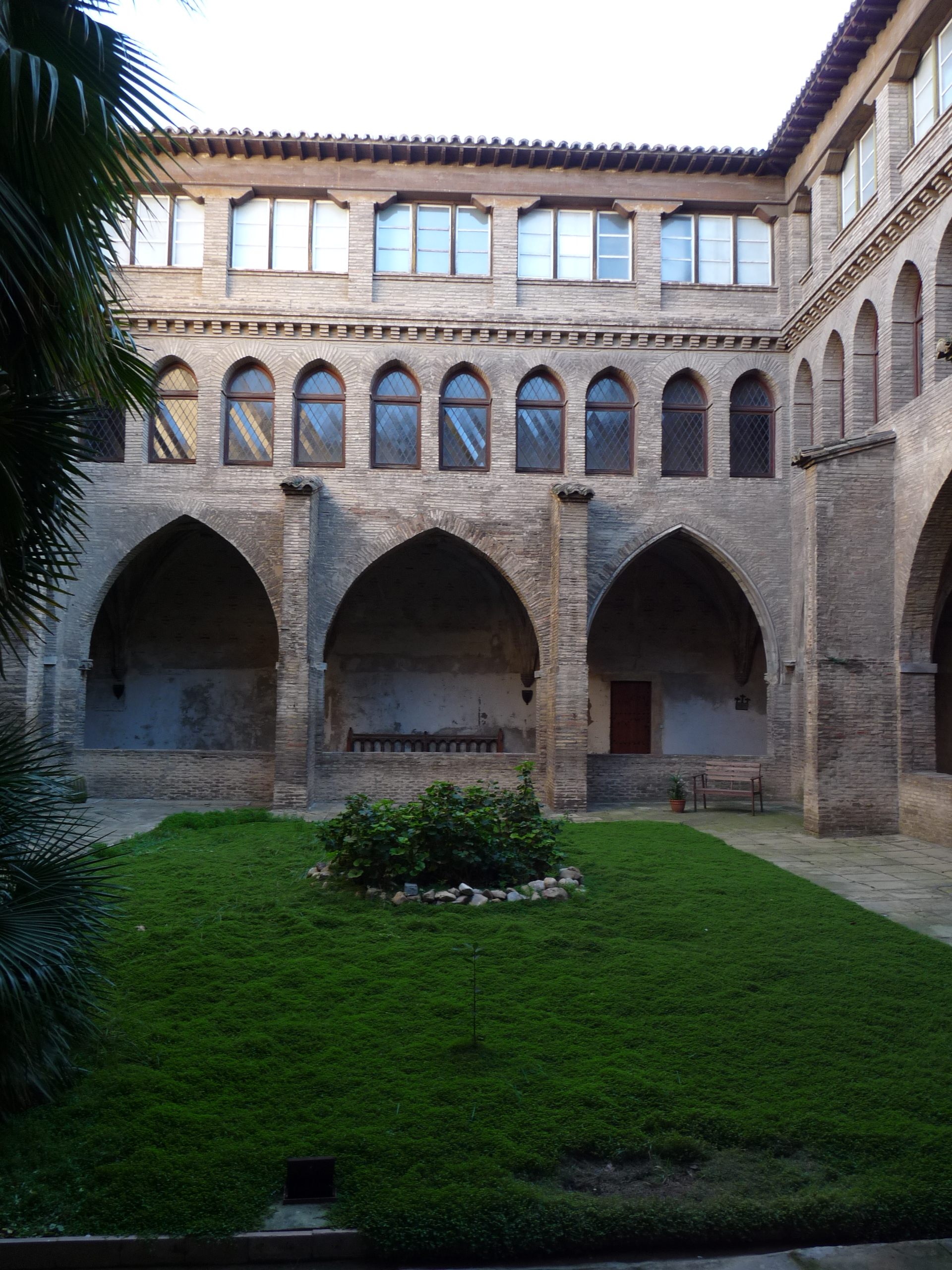 Zaragoza - Convento del Santo Sepulcros. XIII-XIV - Claustro